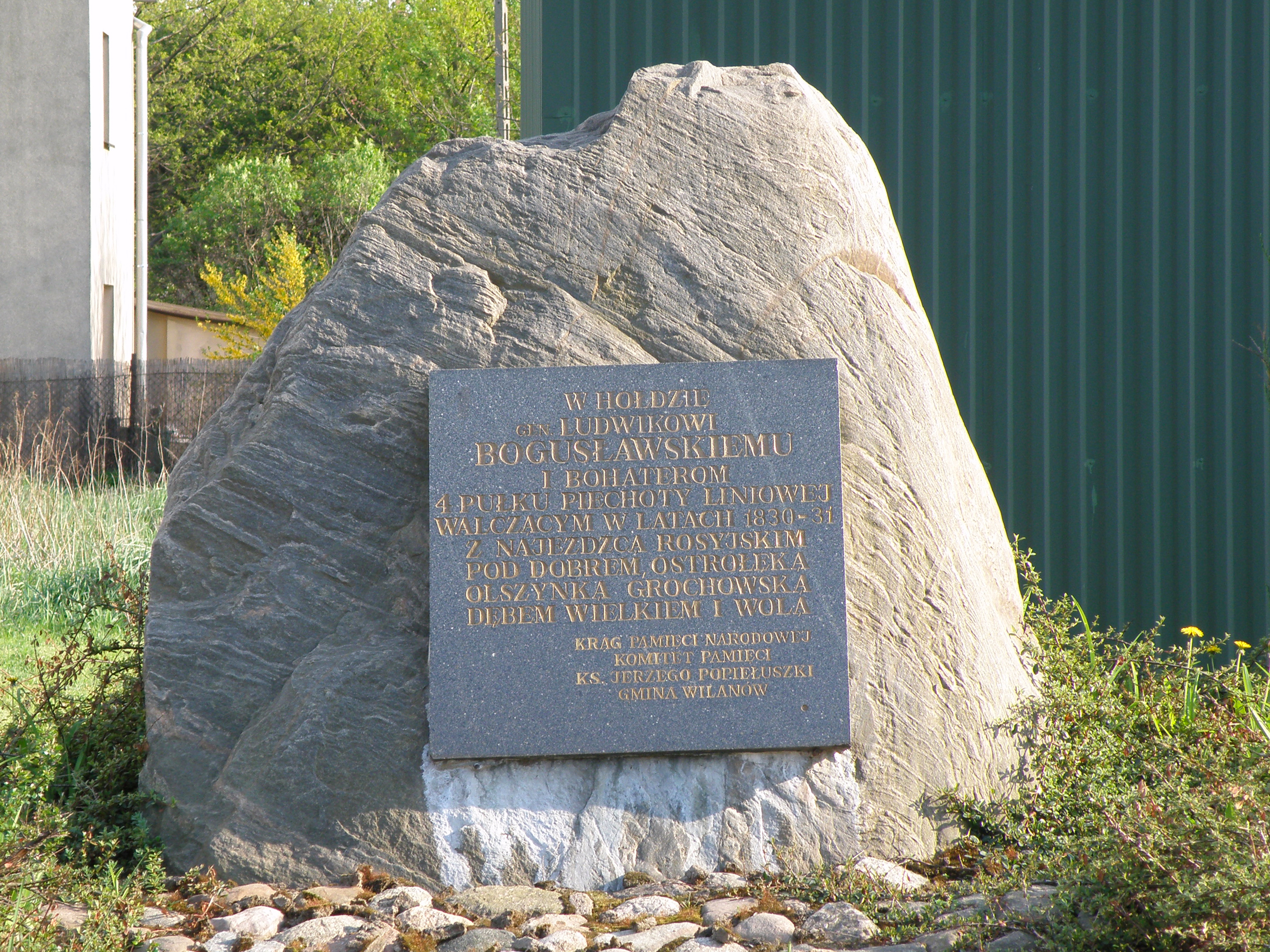 Olszynka Grochowska - Aleja Chwały, ul. Traczy